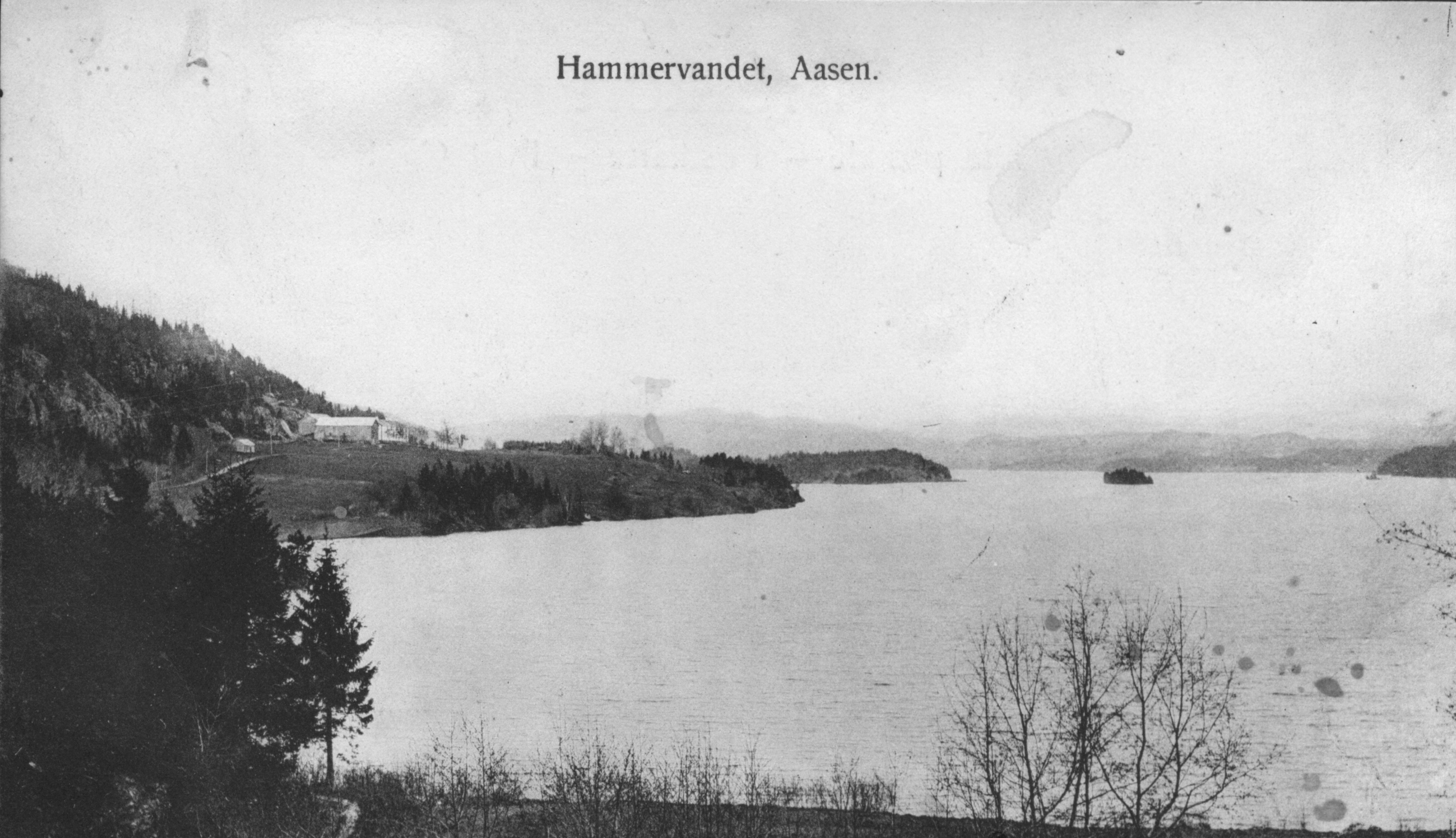 "Hammervandet, Aasen" fotografert fra Fårabotnen tidlig på 1900-tallet. Til venstre er gårdstunet i Fåra (228-1). Fotograf / Photographer: Ukjent Fotoeier / Photo owner: Karl Ove Lynum Digitalisering / Digitizing: Arne Langås Foto-ID / Photo ID: 028-0025 Hvis bildet gjengis i andre sammenhenger, oppgi Åsen Museum og Historielag, fotoeier og fotograf som kildereferanse. Har du utfyllende opplysninger? Legg gjerne igjen en kommentar nedenfor eller send e-post til . | If you re-use this photo, please refer to Åsen Museum og Historielag, the photographer and the owner of the photo. Do you have additional information? Please leave a comment or send an e-mail to .